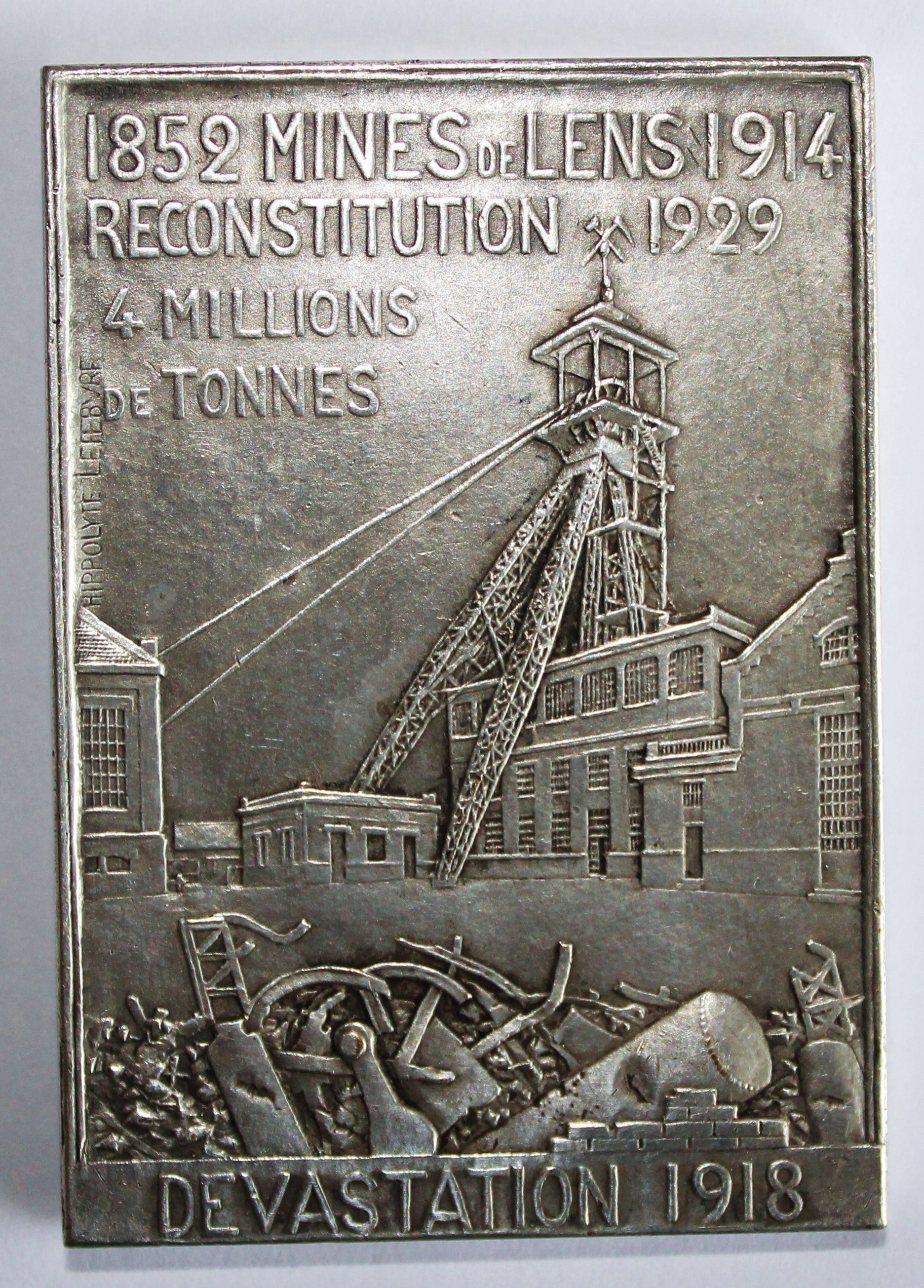 Médaille rectangulaire des mines de Lens après la dévastation de 1918, reconstruction 1929 et commémoration du cap de production de 4 millions de tonnes de charbon. L'avers est de Oscar Roty et ce revers de Hippolyte Lefebvre